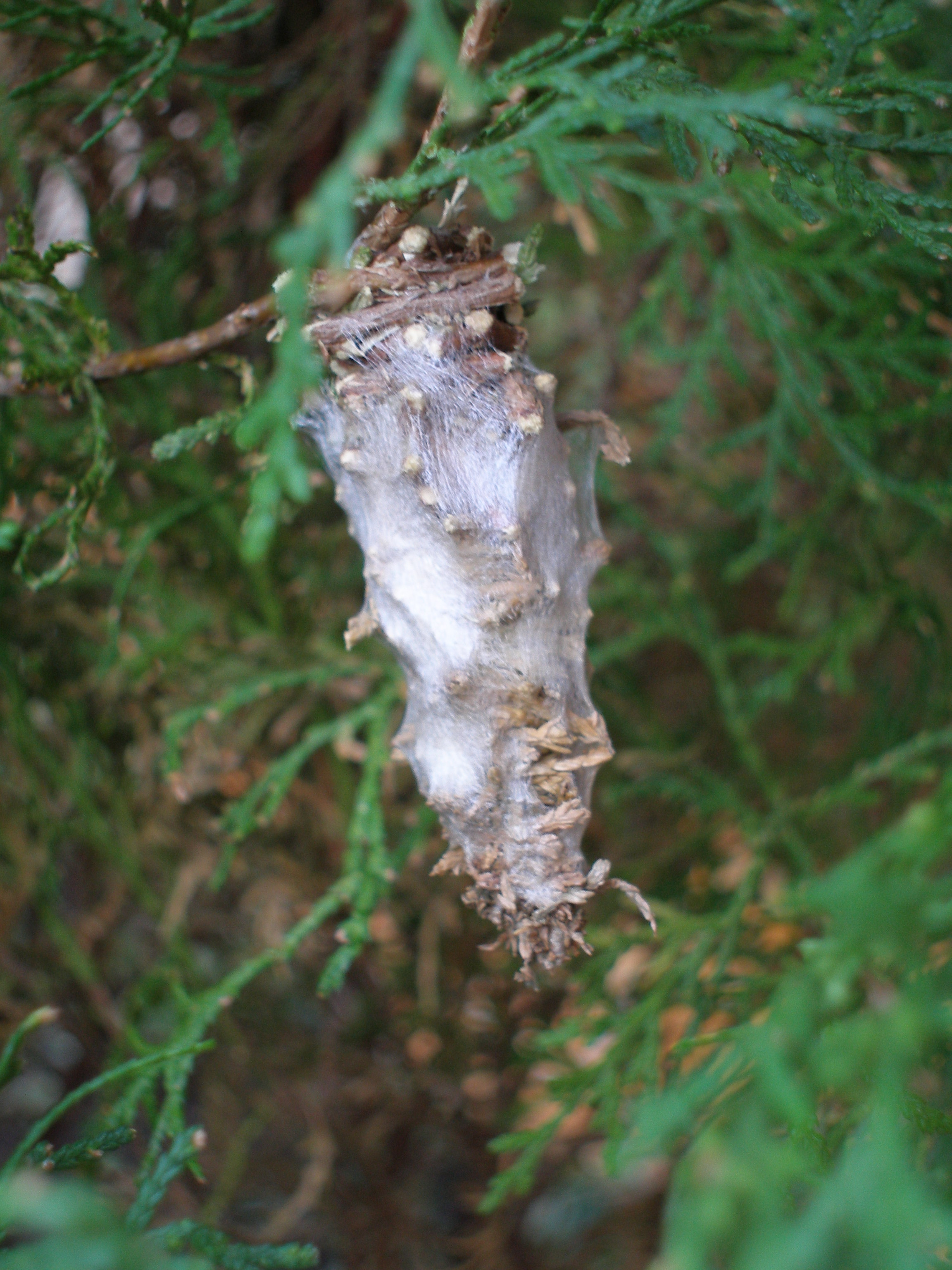 Oiketicus kirbyi,(Lepidoptera: Psychidae)Gusano Canasta,"basket‑worm", Nicaragua